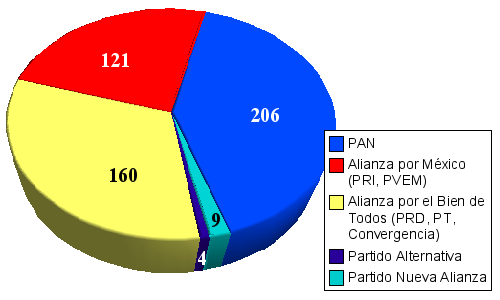 Composición de la Cámara de Diputados de la LX Legislatura del Congreso de la Unión de México, de acuerdo a los resultados del conteo distrital de la elección de 2006.